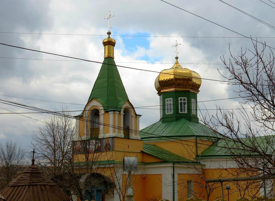 Biserica „Sf. M. Mc. Gheorghe” din Cojușna